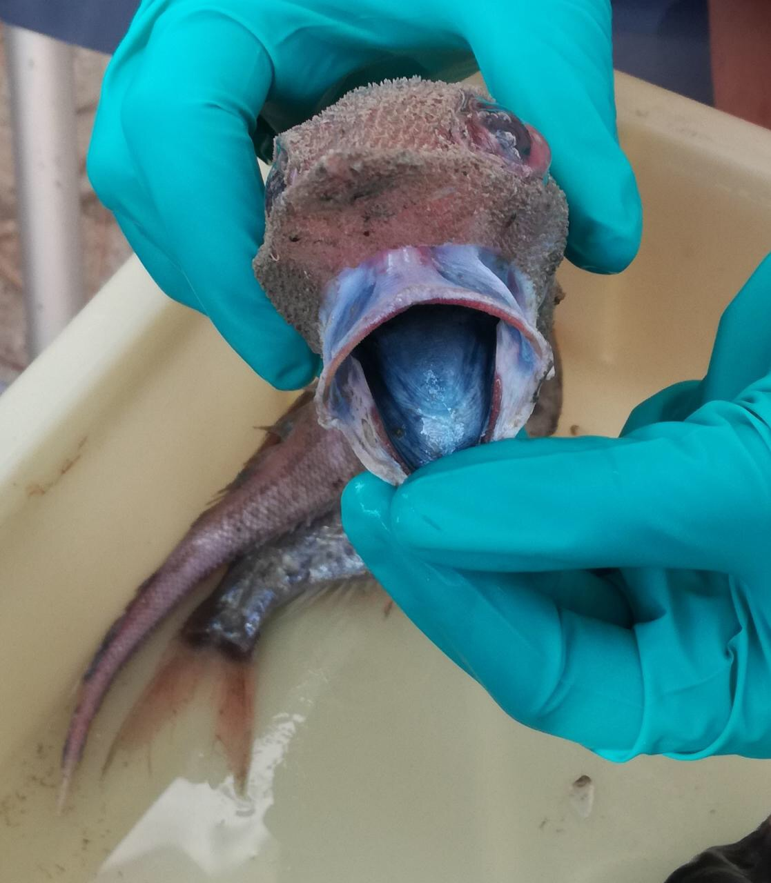 Maul von Trachyrhynchus trachyrhynchus aus Tamariu, Spanien 2017